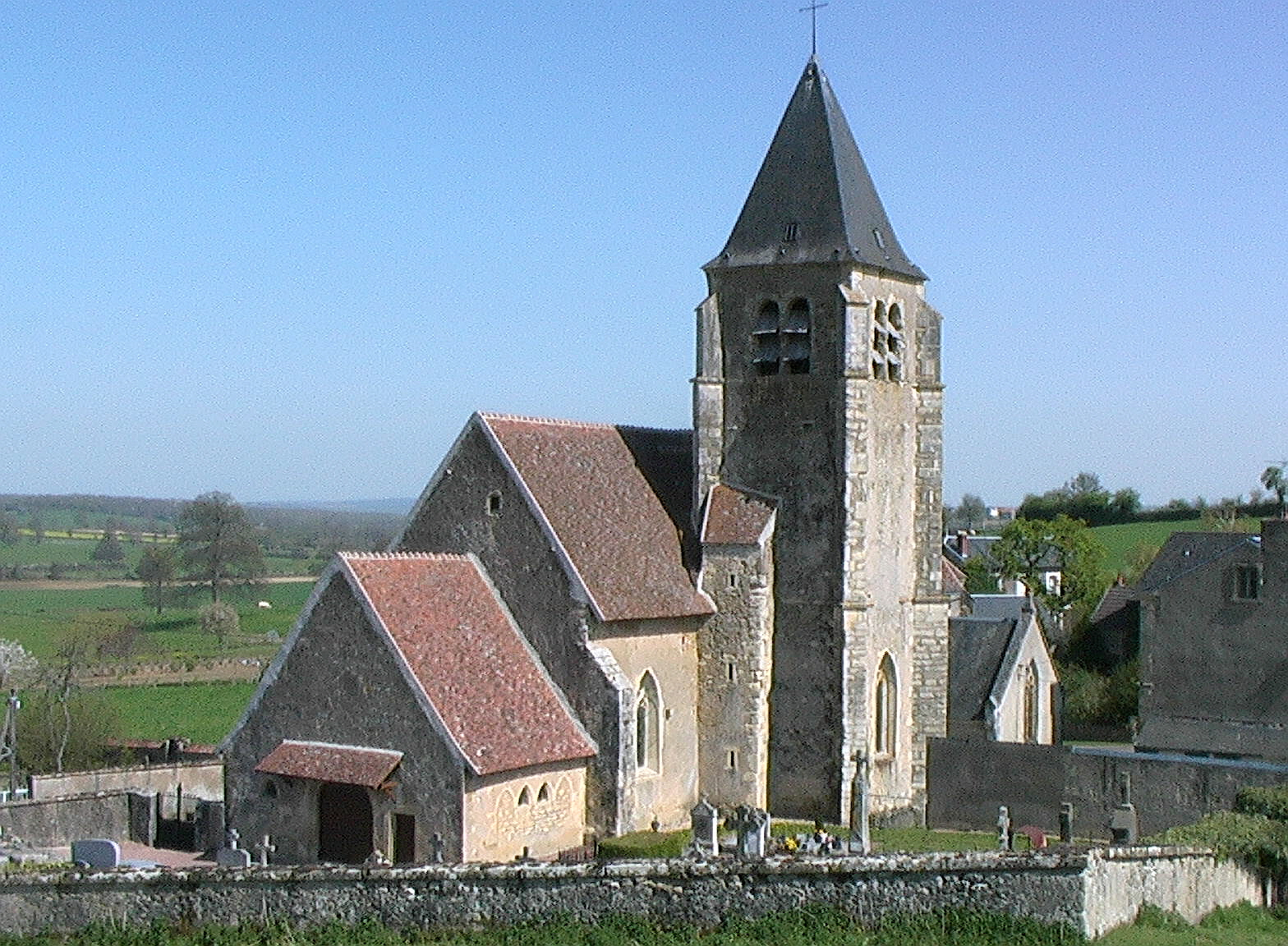 L'eglise Saint Aubin dans le village de Germenay 58800